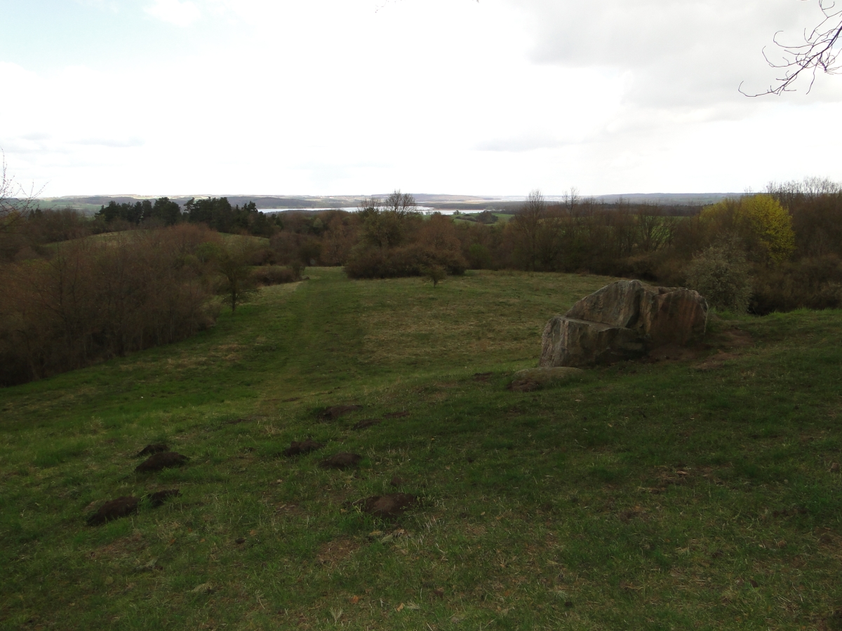 Hellberge bei Neubrandenburg, Mecklenburg-Vorpommern. Naturschutzgebiet. - Google Maps - Google Earth